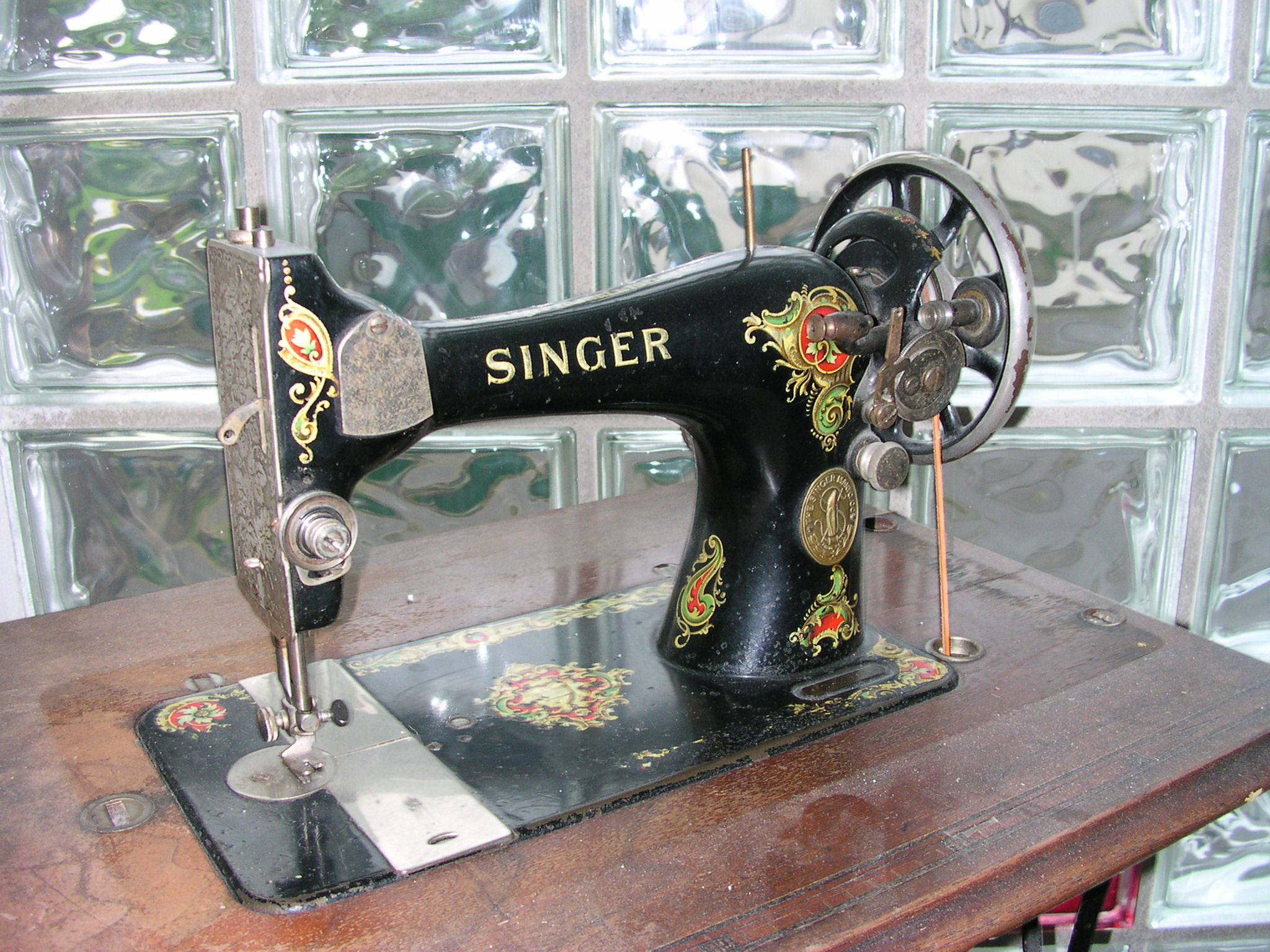 Singer Nähmaschine mit Tisch